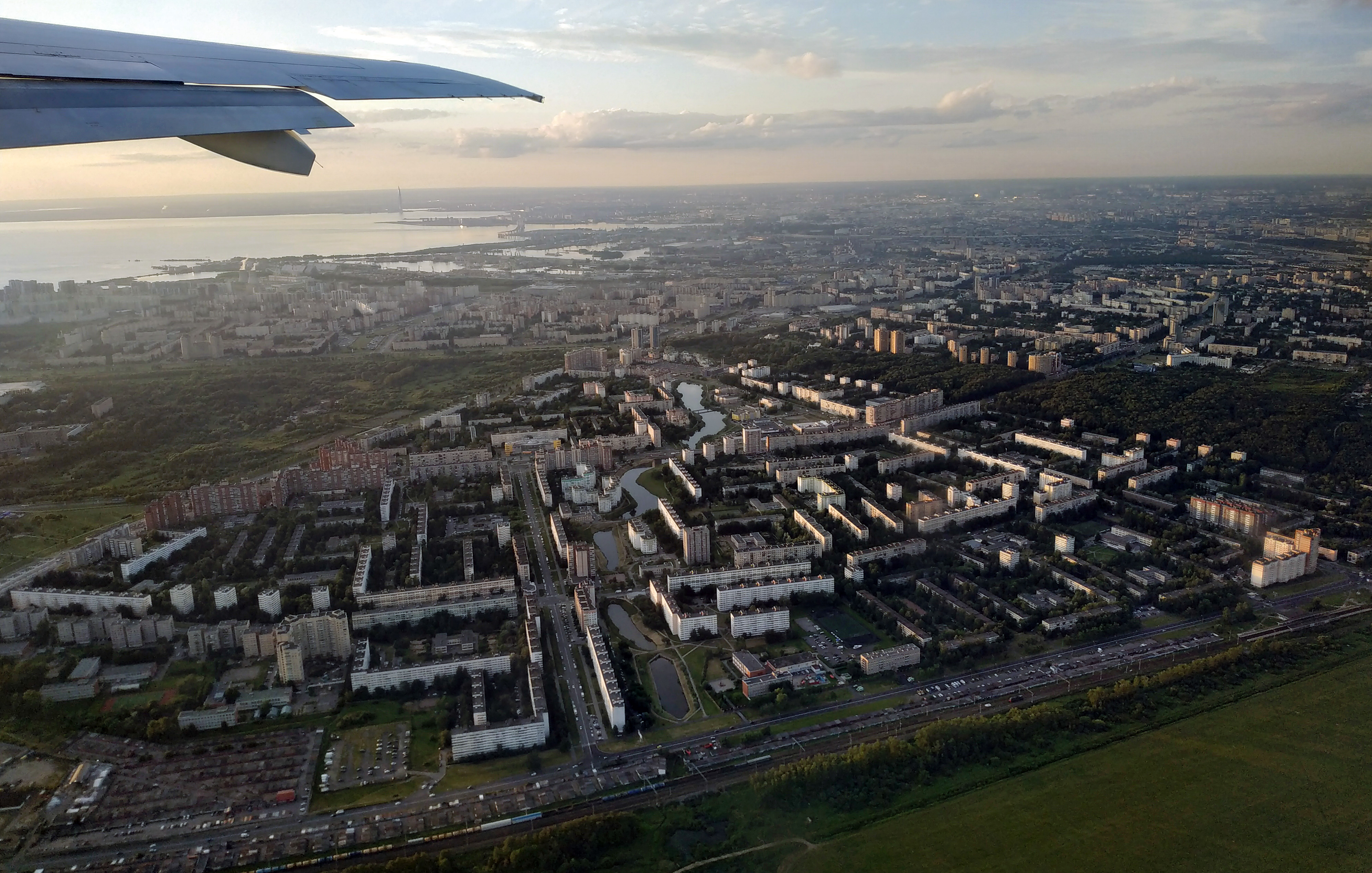 Санкт-Петербург. Вид с самолёта на юго-западную часть города.